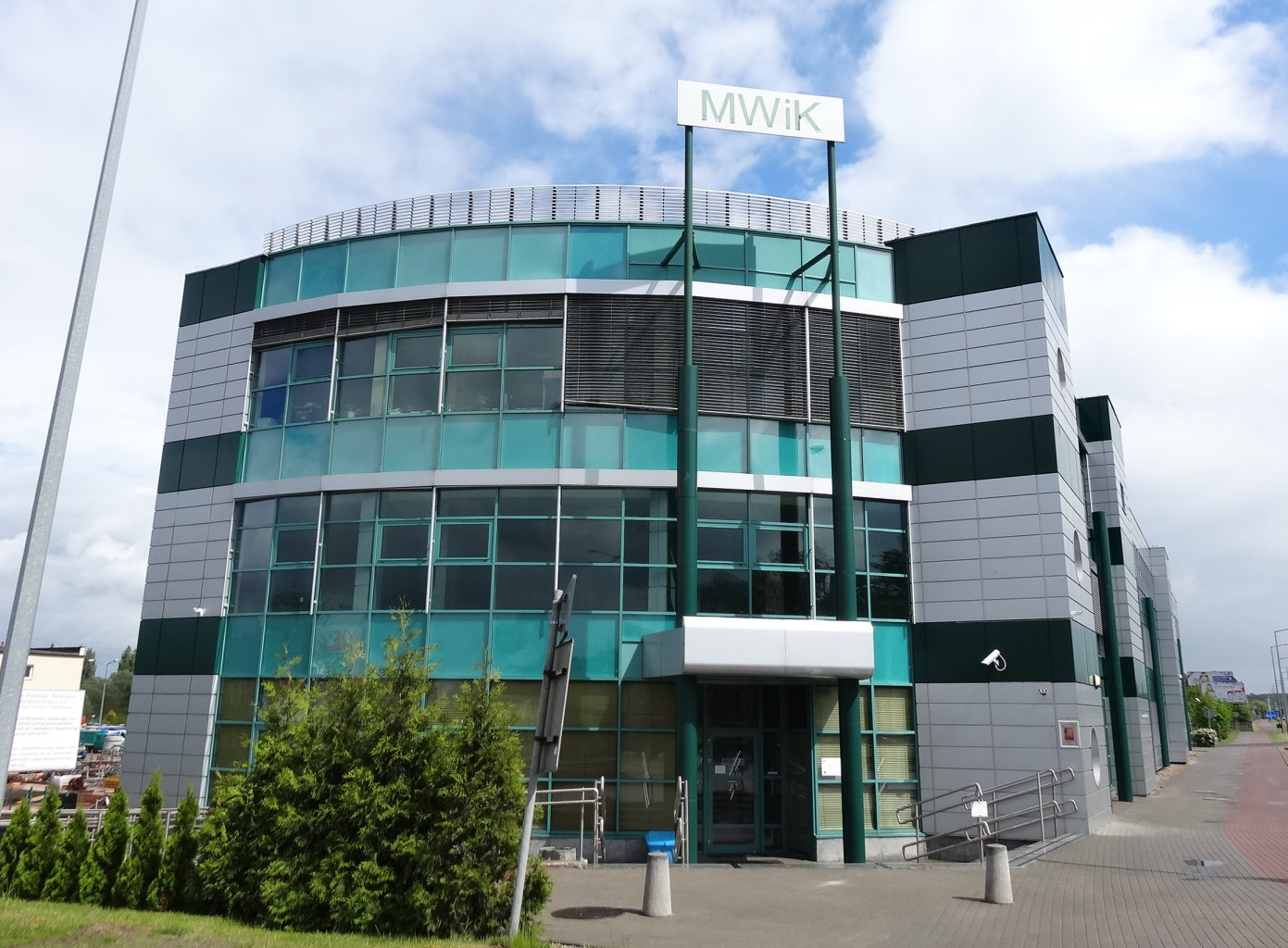 Biurowiec Miejskich Wodociągów i Kanalizacji (MWiK) w Bydgoszczy przy ul. Toruńskiej 103